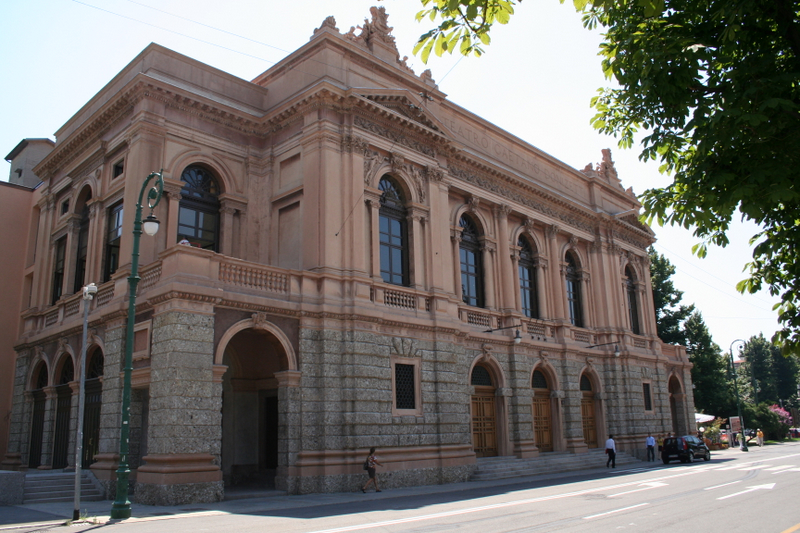 Bergamo, Teatro Donizetti